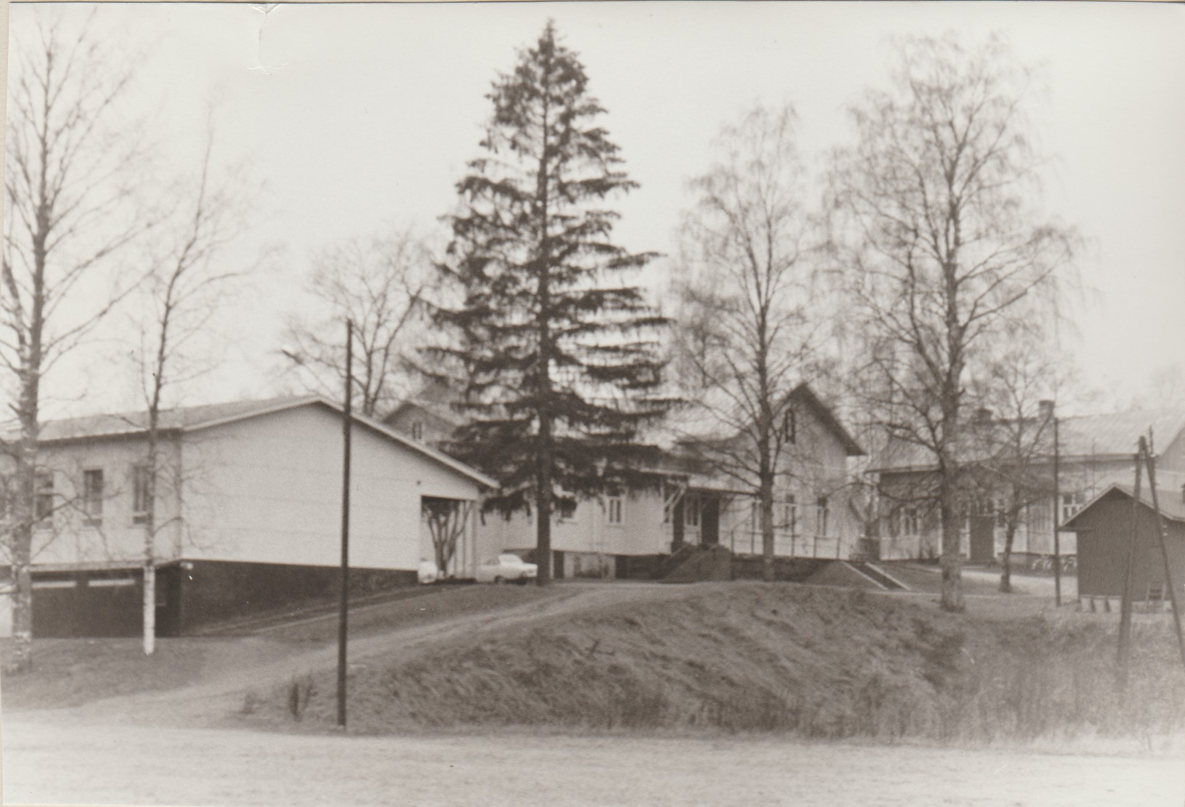 Mustolan koulu, joka toimi 1896-2017